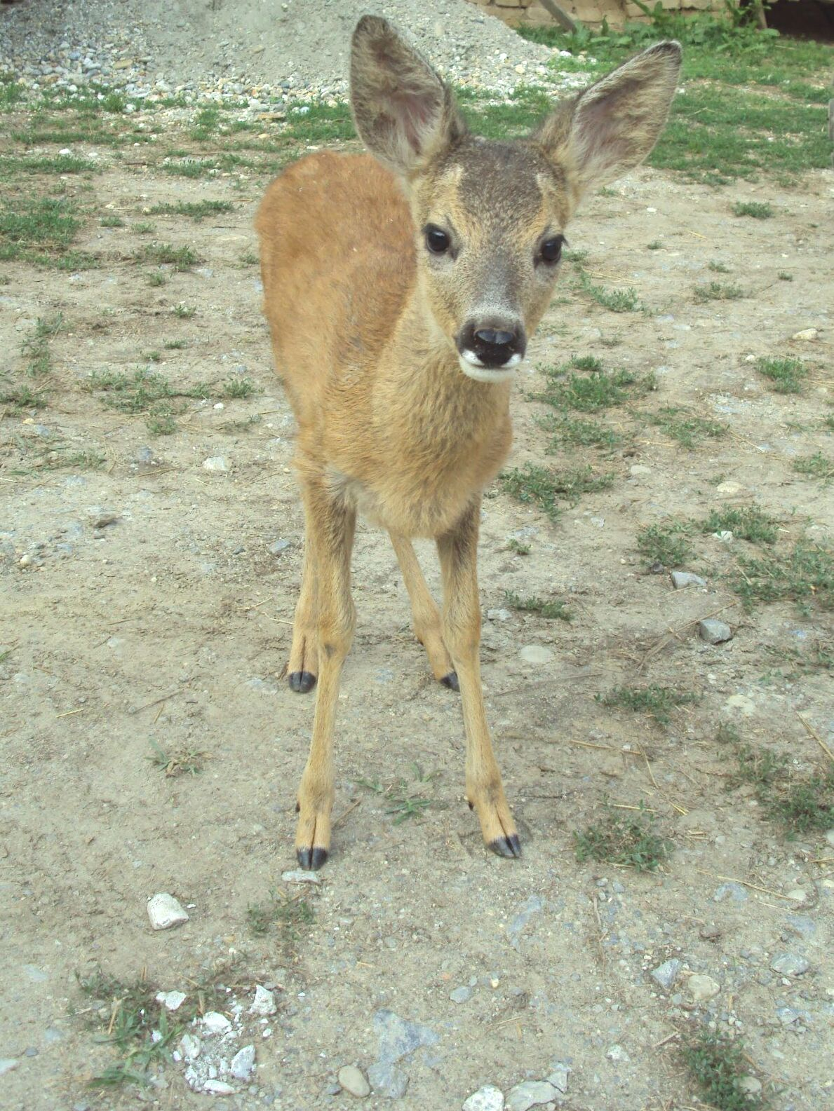 Capreolus capreolus, srna - Puričani, Bjelovar, Croatia